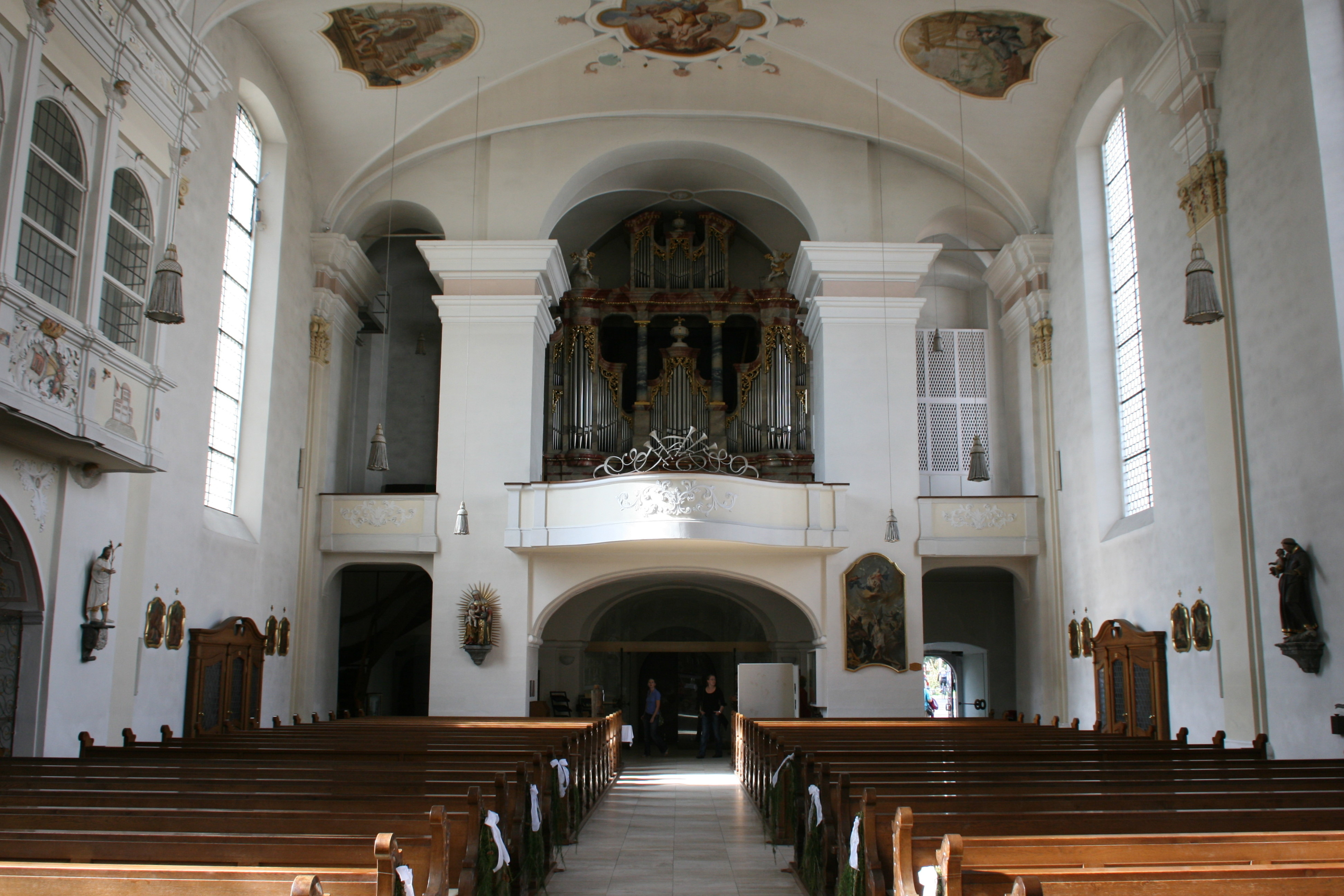 Pfarrkirche St. Martin, Marktplatz in Langenargen